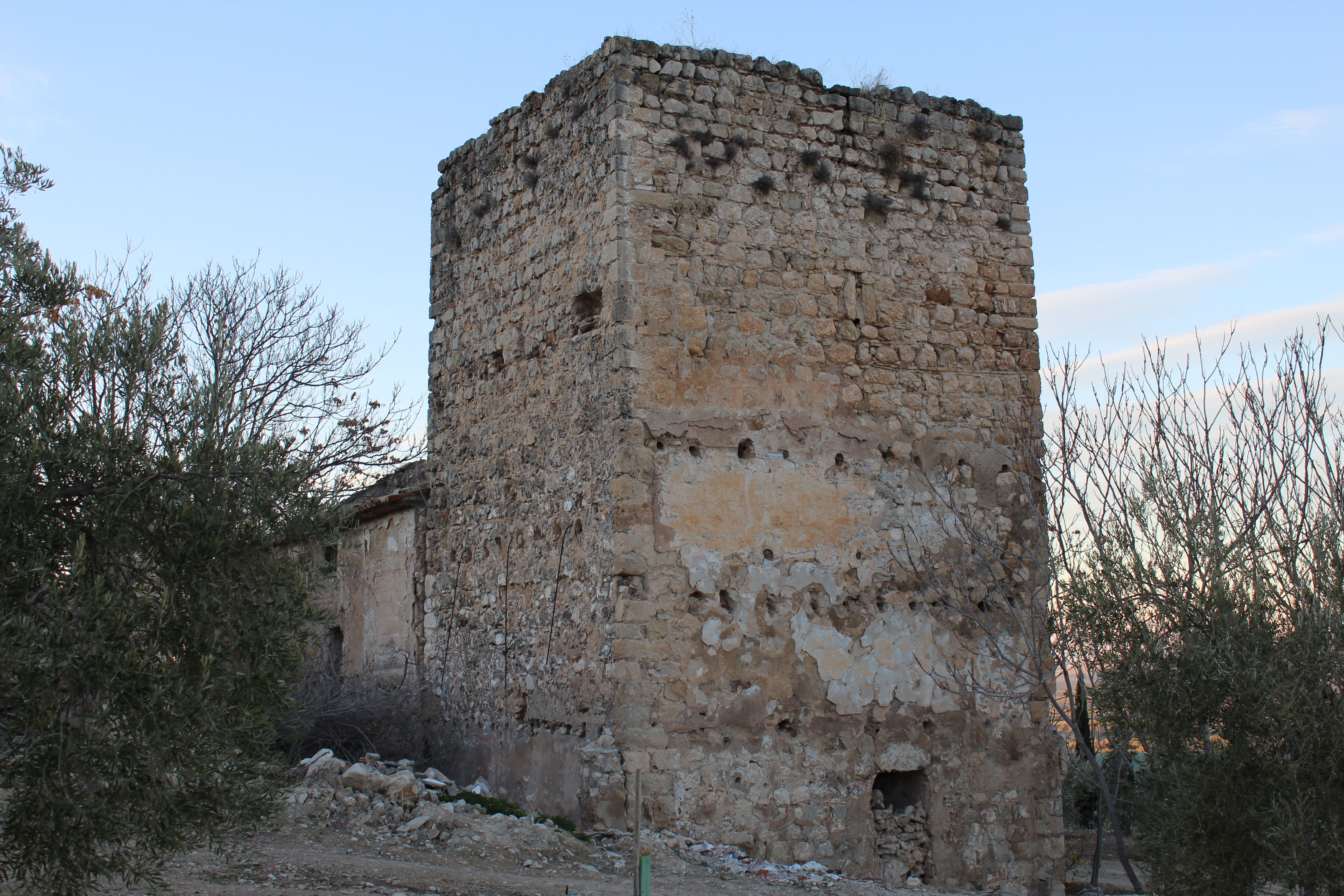 Torre del homenaje del Castillo de Aldehuela.